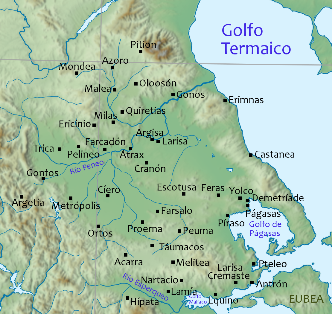 Mapa con algunas de las principales ciudades de la antigua Tesalia y zonas adyacentes.